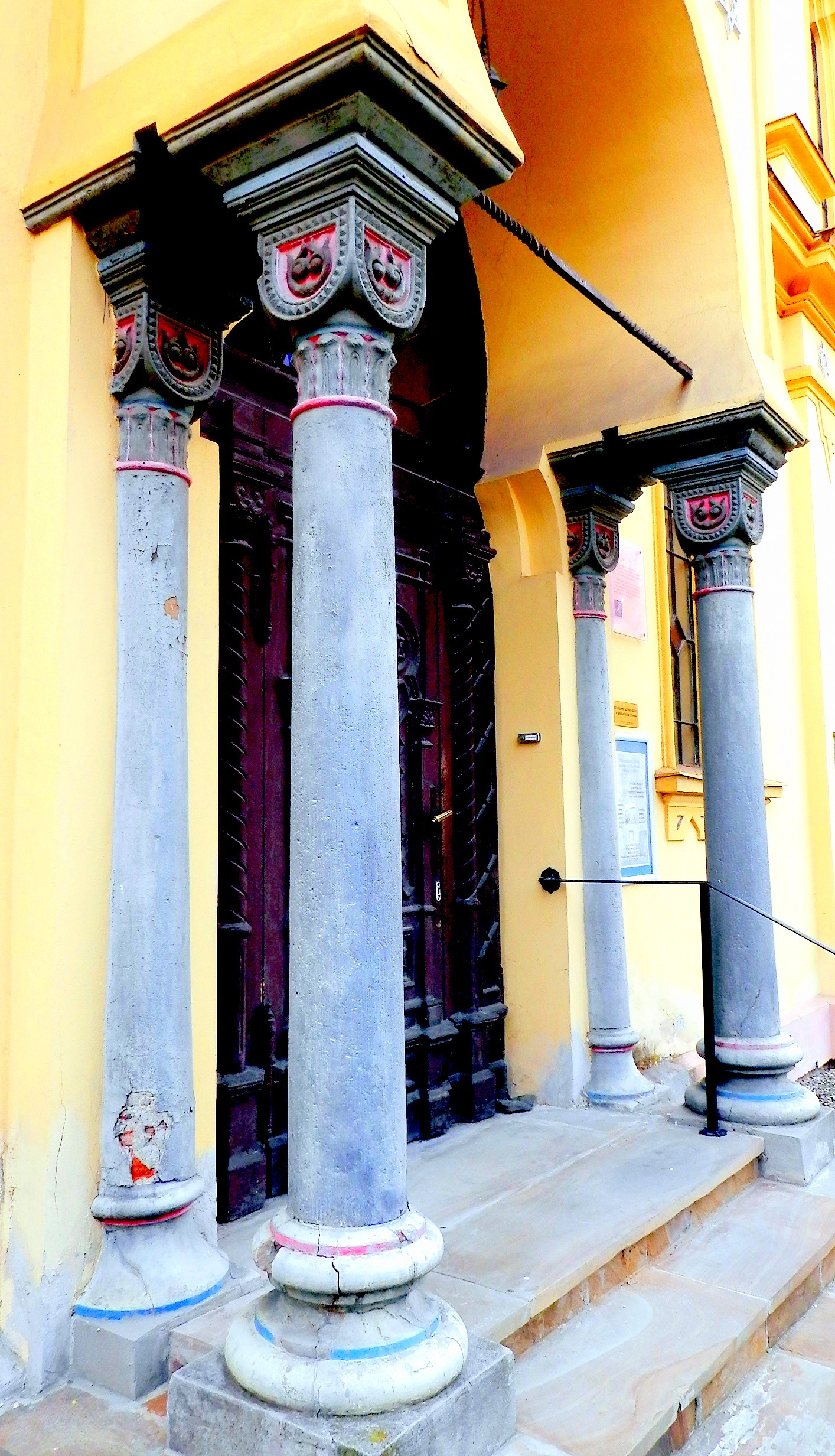 Detail vchodových stĺpov zo severnej strany.. Ortodoxná synagóga bola postavená v roku 1898. Stavba sa dodnes využíva ako modlitebňa. Na ženskej galérii je inštalovaná tzv. Barkányova zbierka judaík – expozícia Múzea židovskej kultúry.